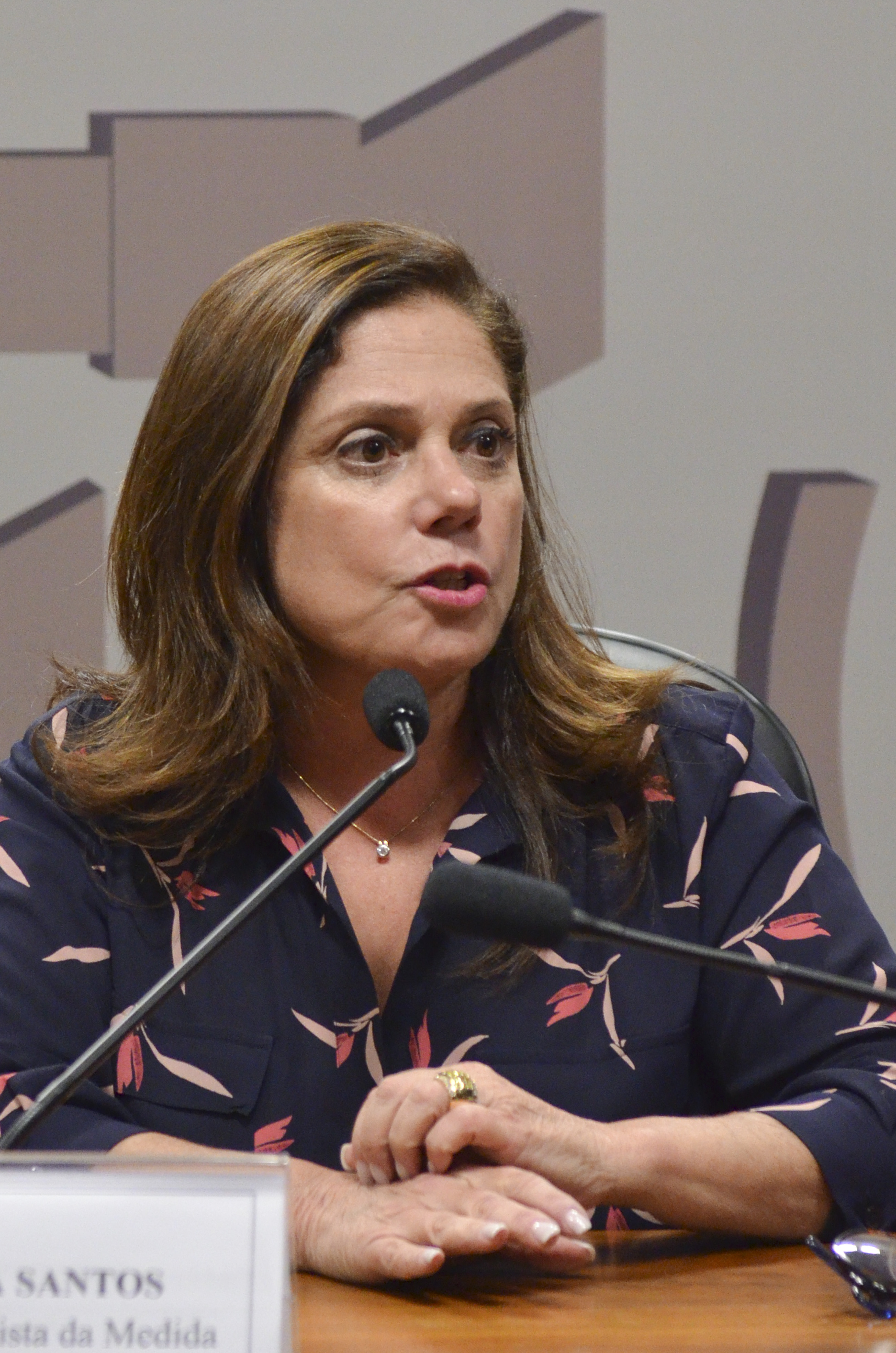 A Comissão Mista da Medida Provisoria (CMMPV) apreciação de relatório sobre a MP 700/2015 que altera regras em desapropriações por utilidade pública. Em pronunciamento, deputada Soraya Santos (PMDB-RJ). Foto: Ana Volpe/Agência Senado.